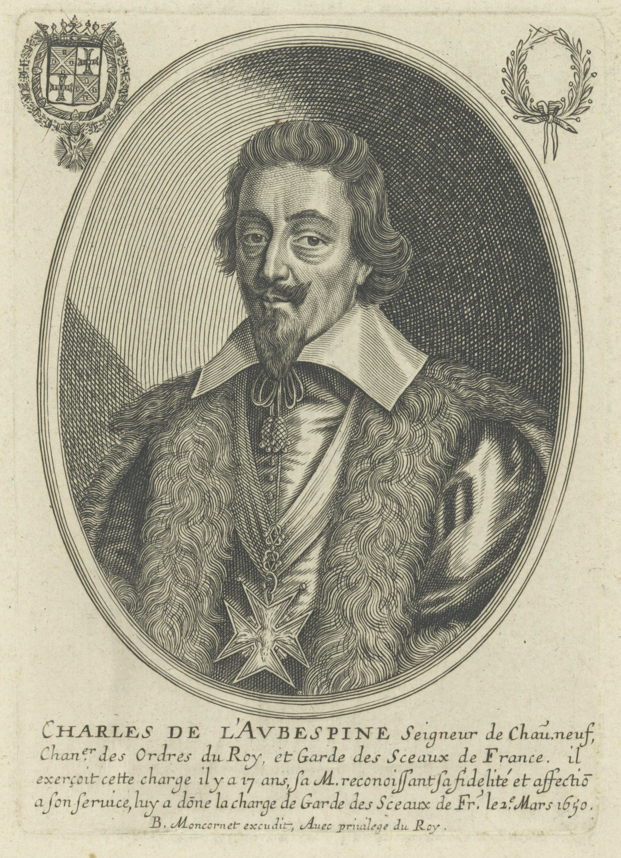 Bildnis des Charles de L'Avbespine. Baltazar Moncornet, Verleger. Paris, 1650/1668, Kupferstich, 16.5 x 11.0 cm (Platte) Nürnberg, Germanisches Nationalmuseum, Graphische Sammlung (Paul Wolfgang Merkel'sche Familienstiftung), Inventar-Nr. MP 1086, Kapsel-Nr. 15